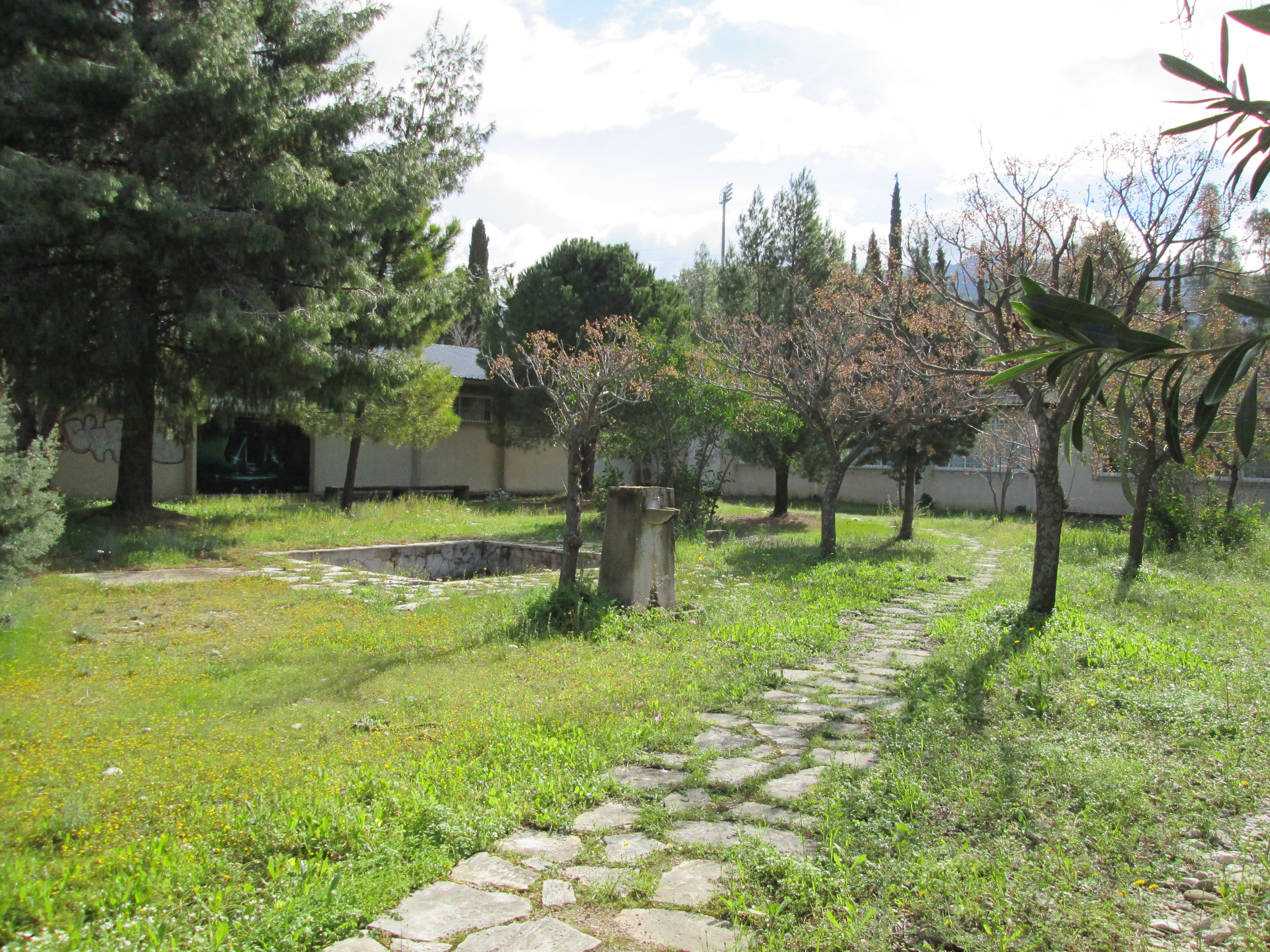 Επιστήμη των Υλικών